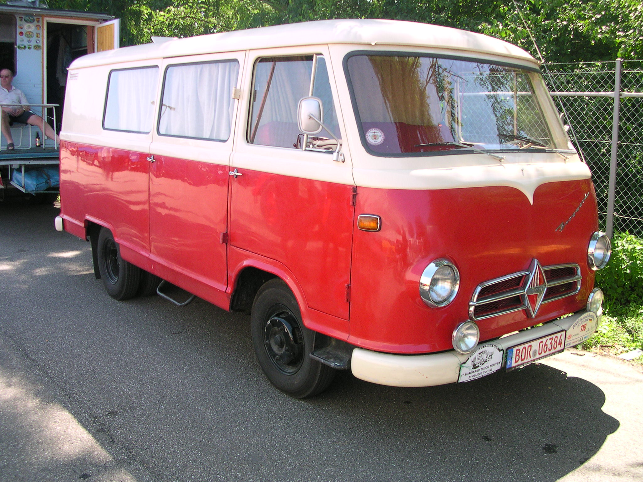 großes Oldtimertreffen im Mercedes-Werk in Wörth am Rhein 2006